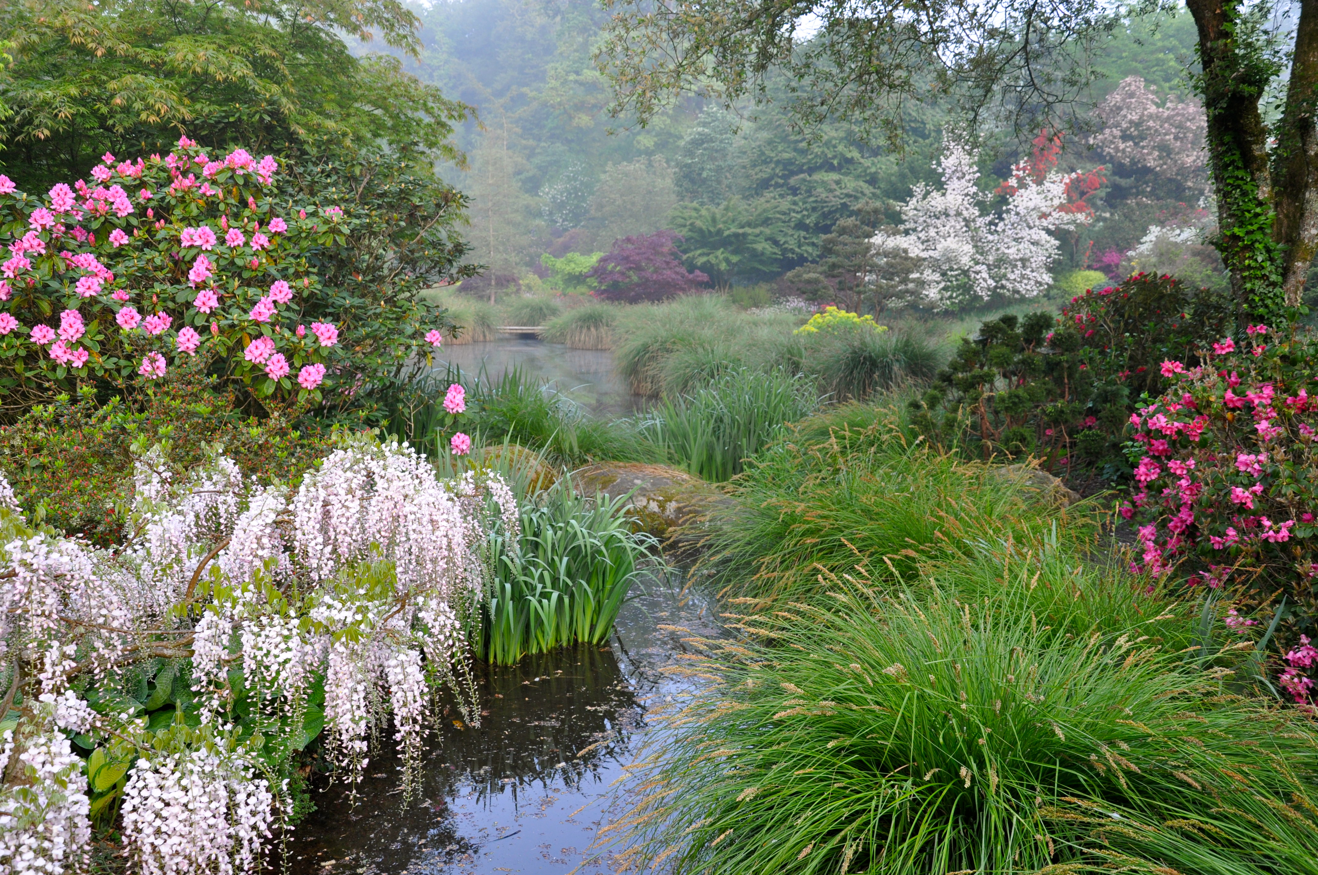 au Parc Botanique de Haute Bretagne en avril 2011